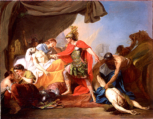 Pierre Lacour, Achille dépose le cadavre d'Hector aux pieds de celui de Patrocle, 1769, Paris, Ecole Nationale Supérieure des Beaux-Arts